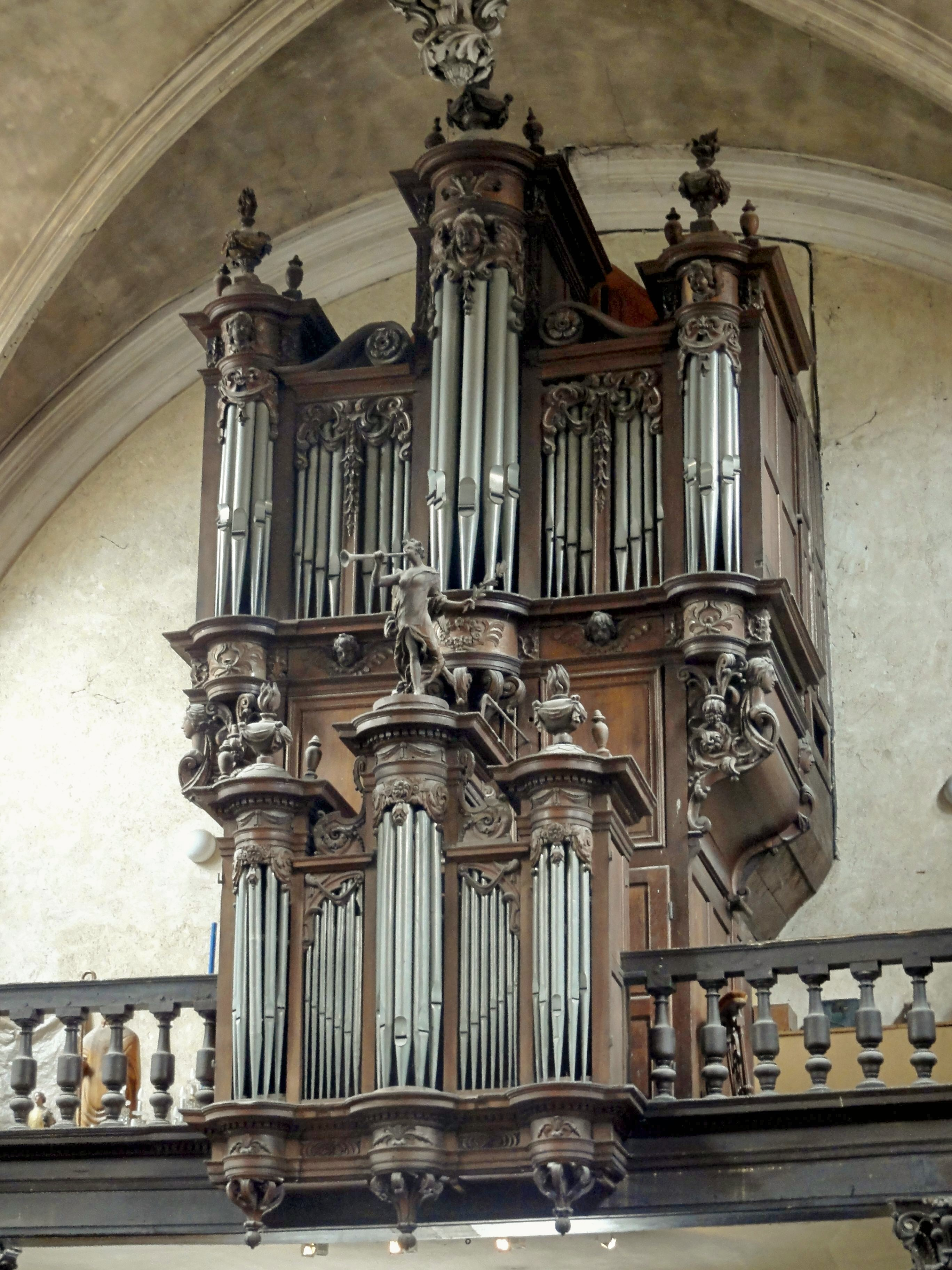 Orgue de tribune de 1639, provenant de l'hôtel-Dieu de Pontoise et construit à l'origine par Pierre Thierry.